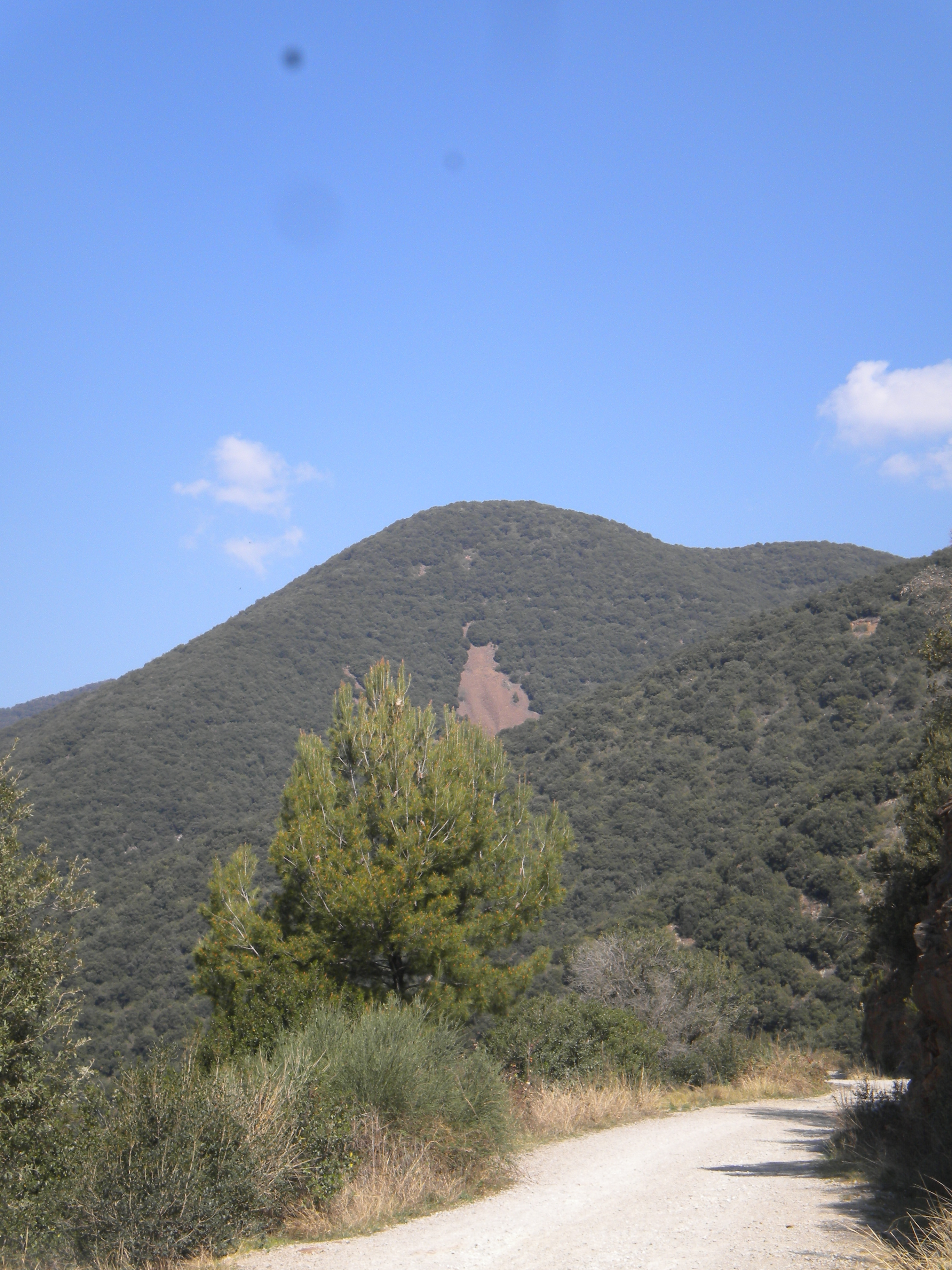 El Morro Negre, al terme municipal de Tagamanent, dins del Parc Natural del Montseny.